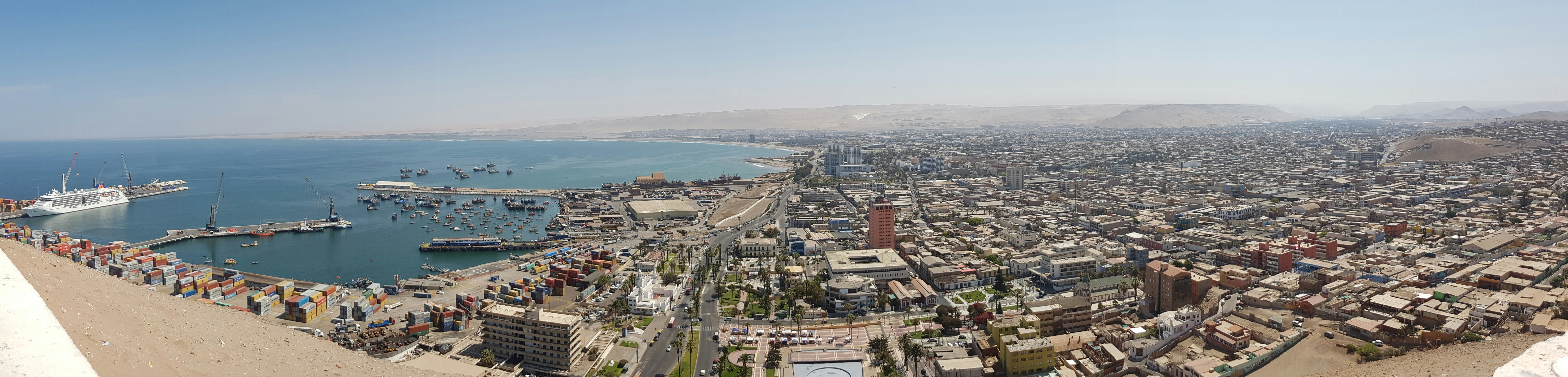 Vista panorámica de la ciudad de Arica